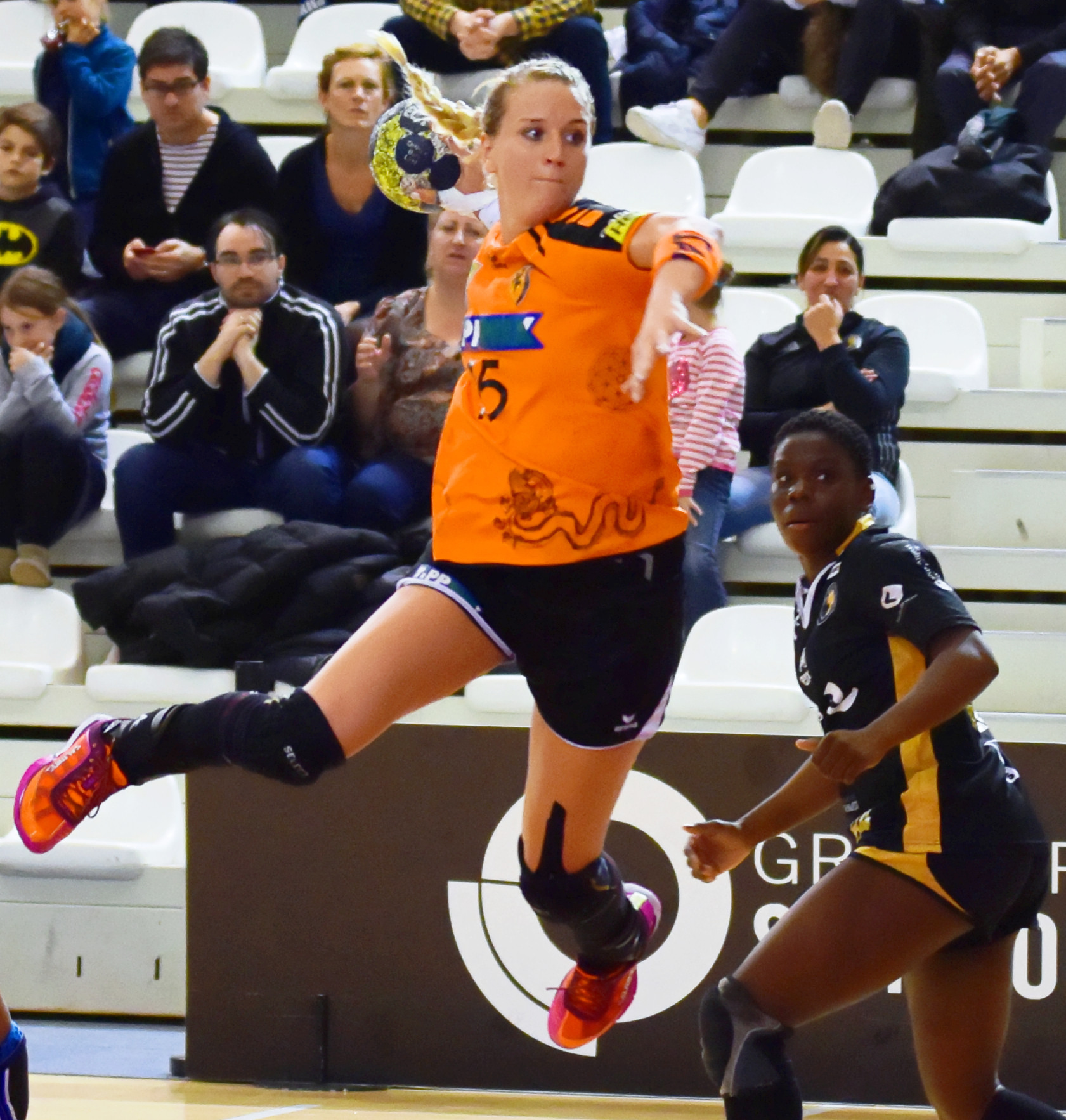 Rencontre retour du 3e tour de la coupe EHF, Issy Paris Hand / Erd. A Issy Les Moulineaux, le 18 novembre 2017.